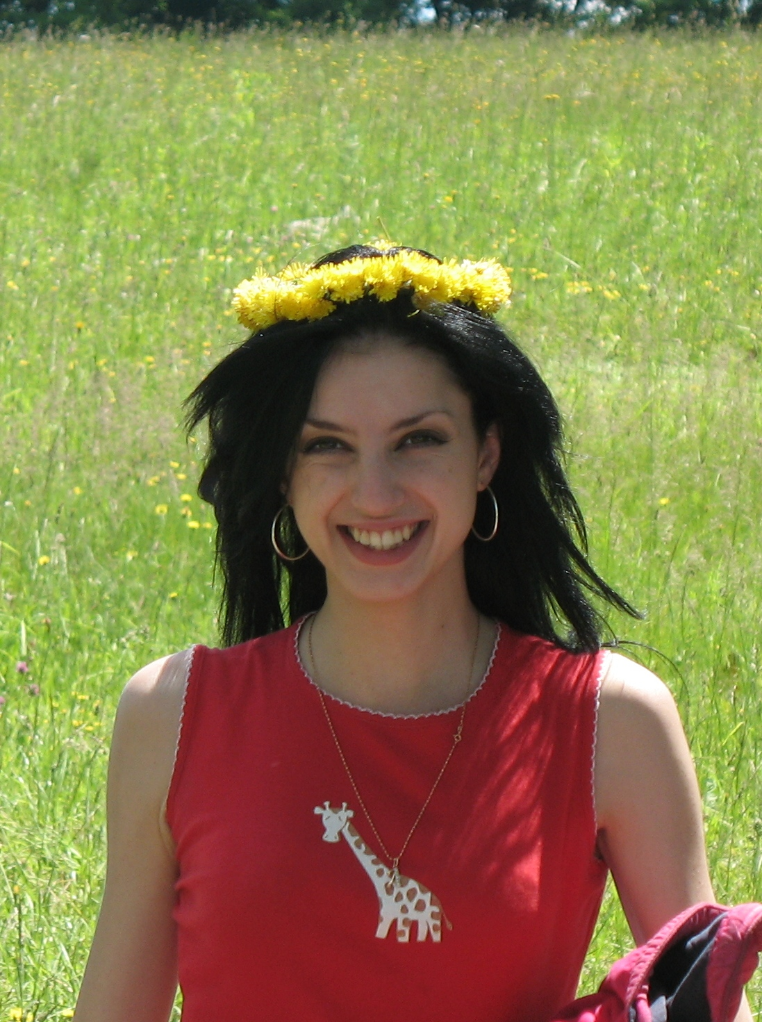 Дочка народної артистки України Ярослава Мосійчук Анна.